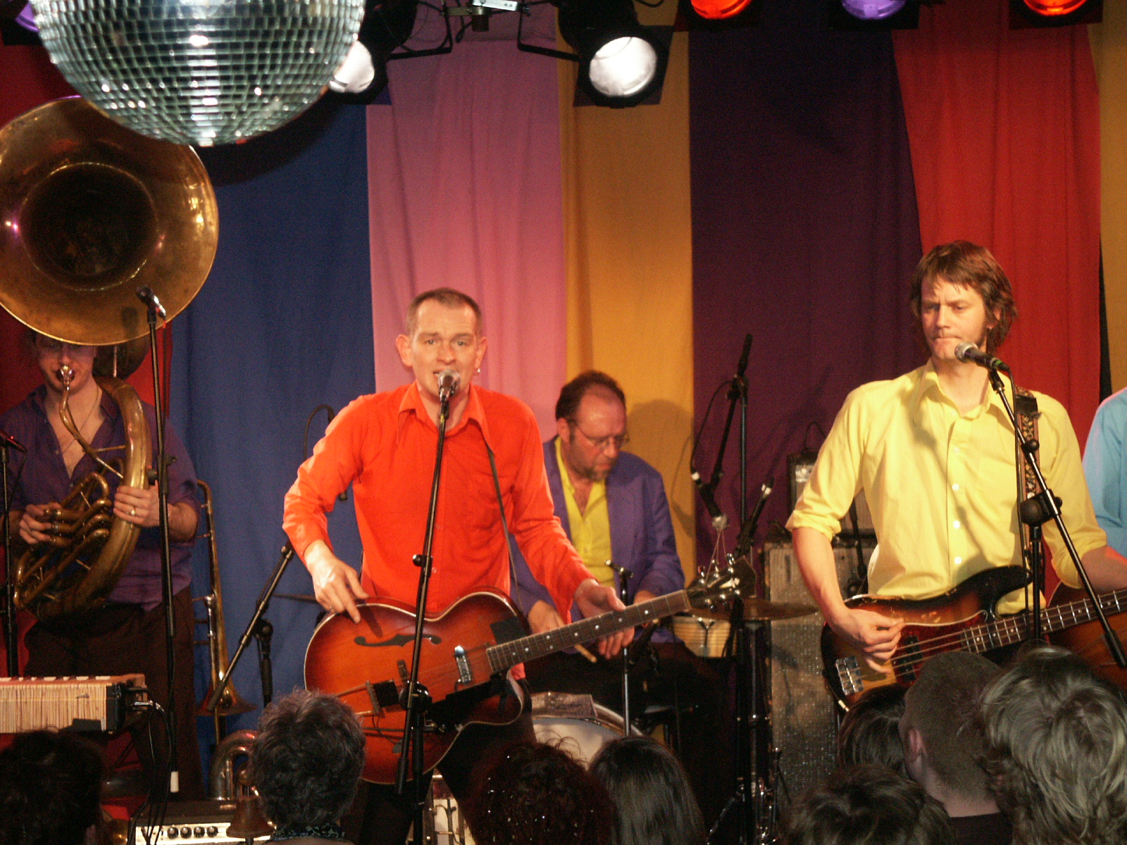 De kift in het ACU te Utrecht op 19 maart 2006.